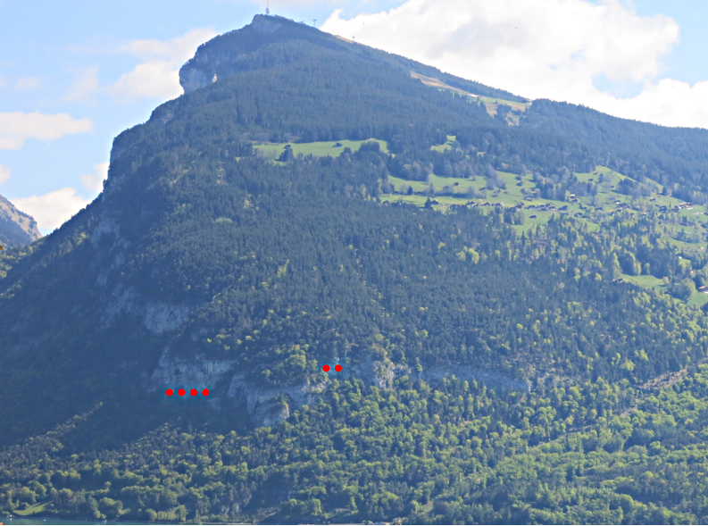 Artilleriewerk Schmockenfluh, Beatenberg BE, Schweiz